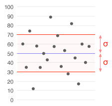 Standard deviation illustration